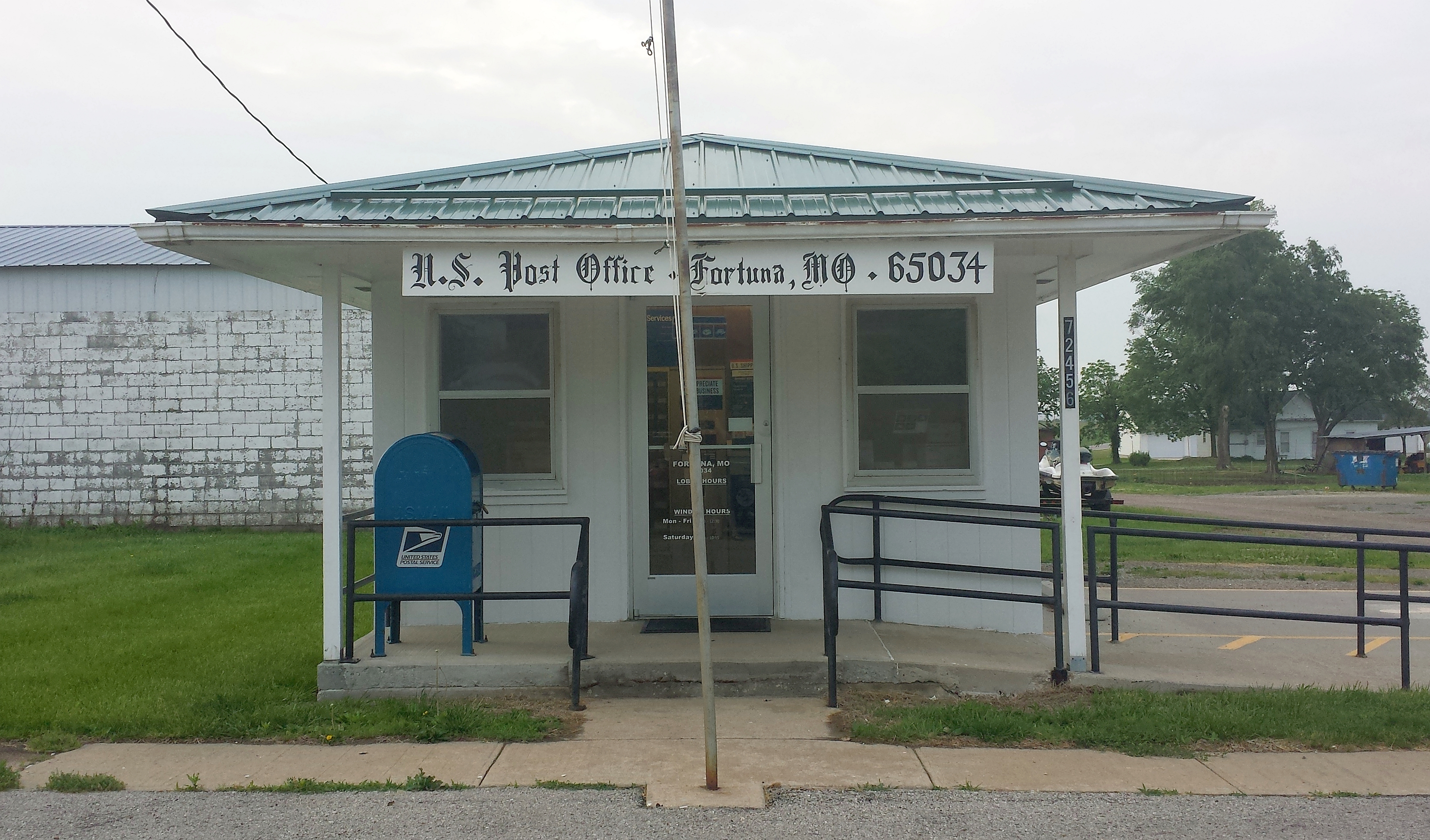 Post Office, Fortuna, Missouri.